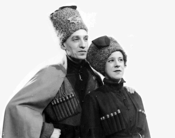 Lionel Daunais et Caro Lamoureux, dans l’opérette Le tzarewitch